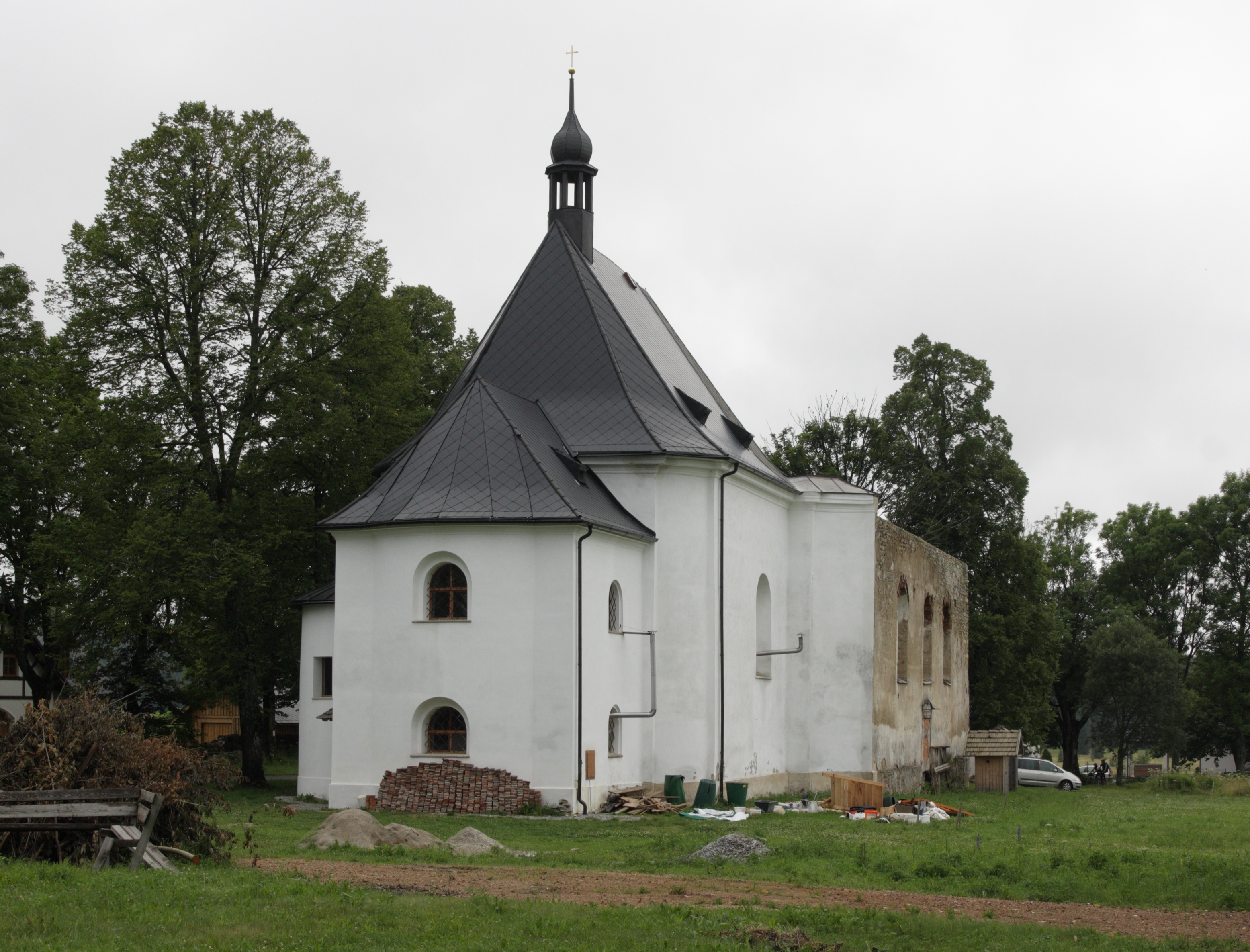 Pohoří na Šumavě - kostel Svaté Panny Marie Dobré Rady, rekonstruovaný závěr.